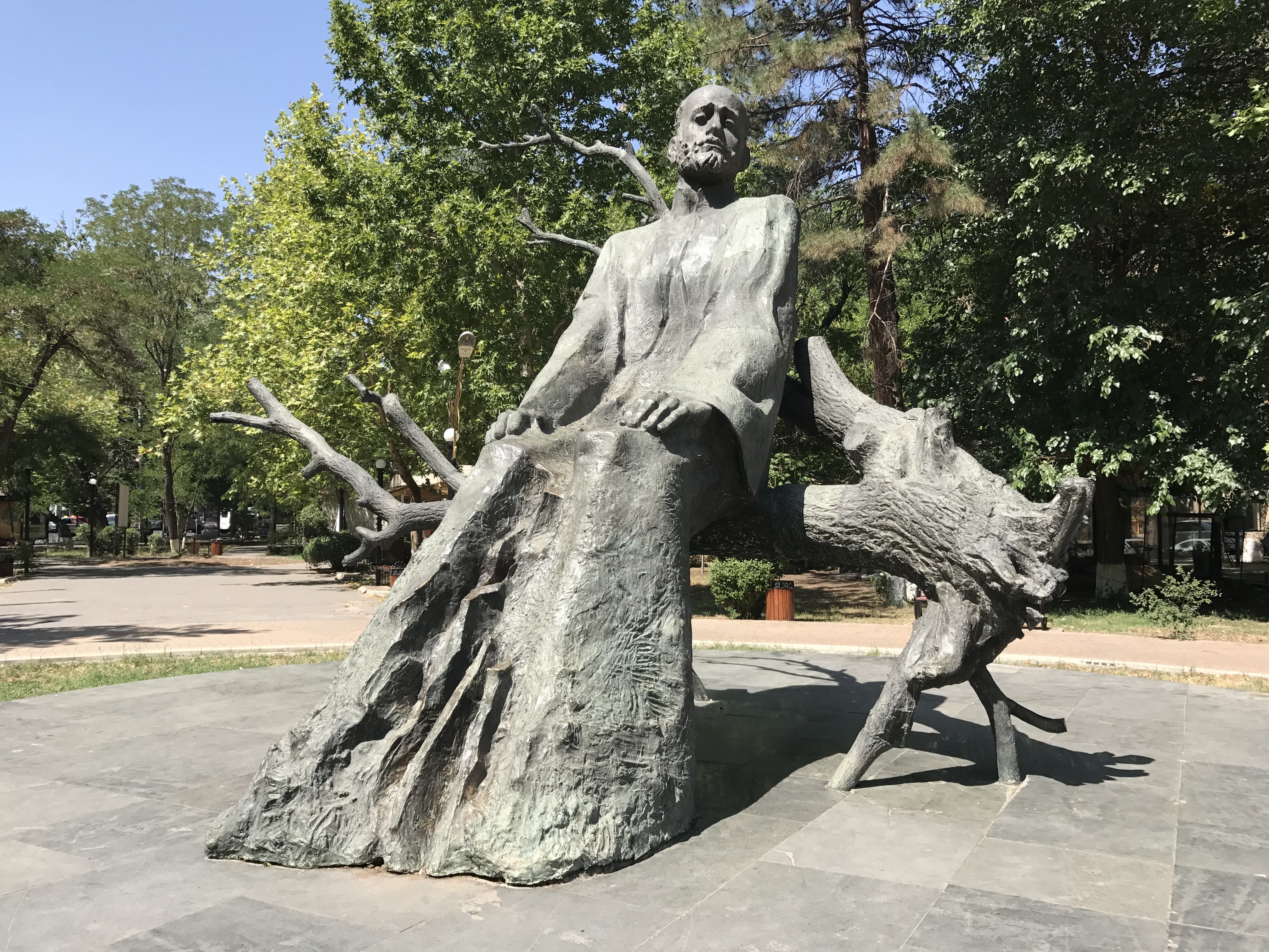 Statue de Komitas à Erevan par Ara Harutyunyan (scumpteur) et Feniks Darbinyan (architecte).